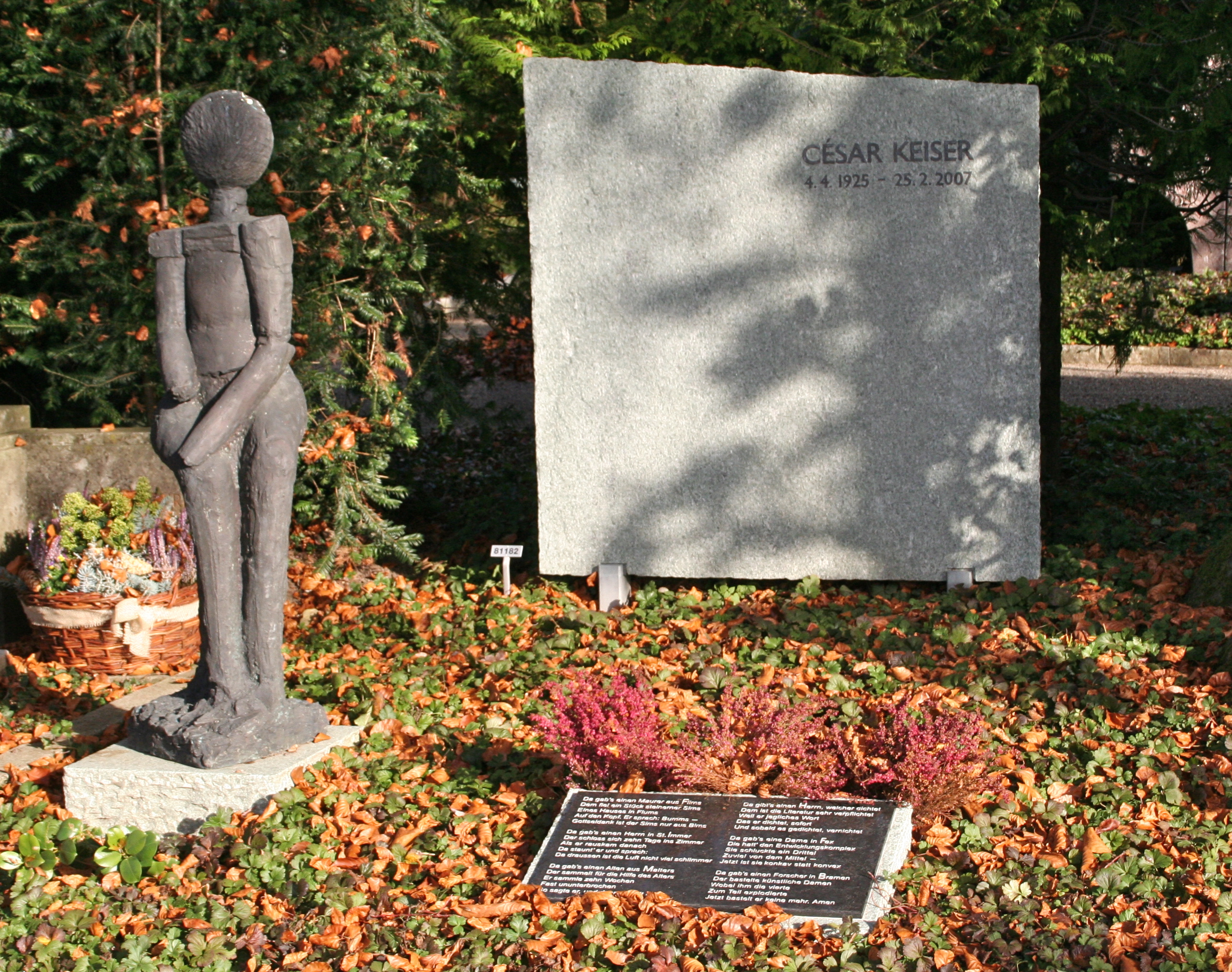 Friedhof Enzenbühl in Zürich Grabmal César Keiser